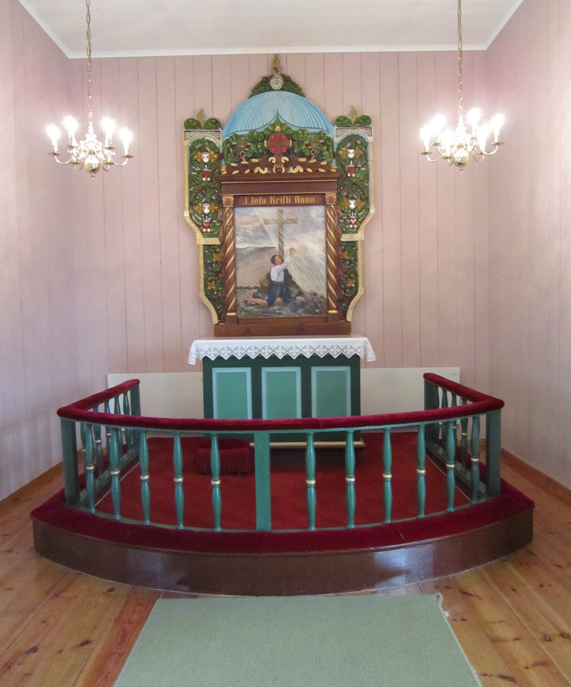 Alterparti i Dagali kirke